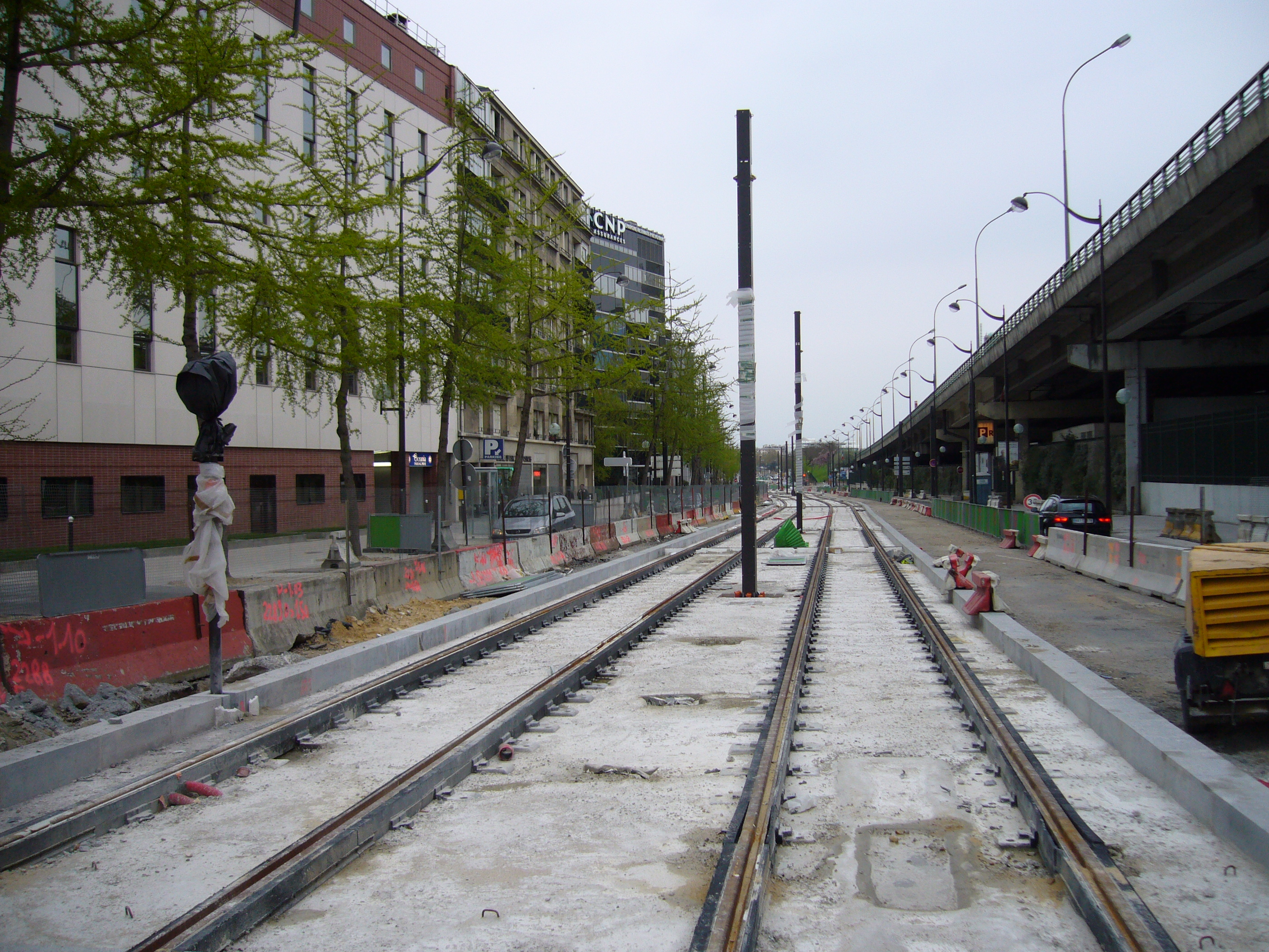 Vue des travaux de prolongement de la ligne 2 du tramway d'Île de France à la Porte de Versailles rue d'Oradour-sur-Glane.